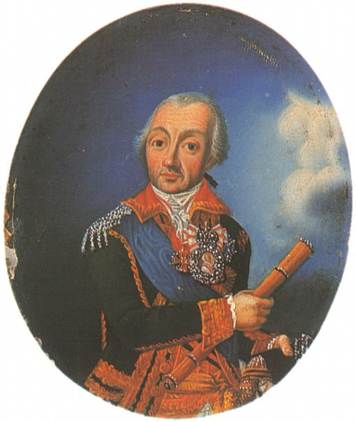 Alexander Suvorov